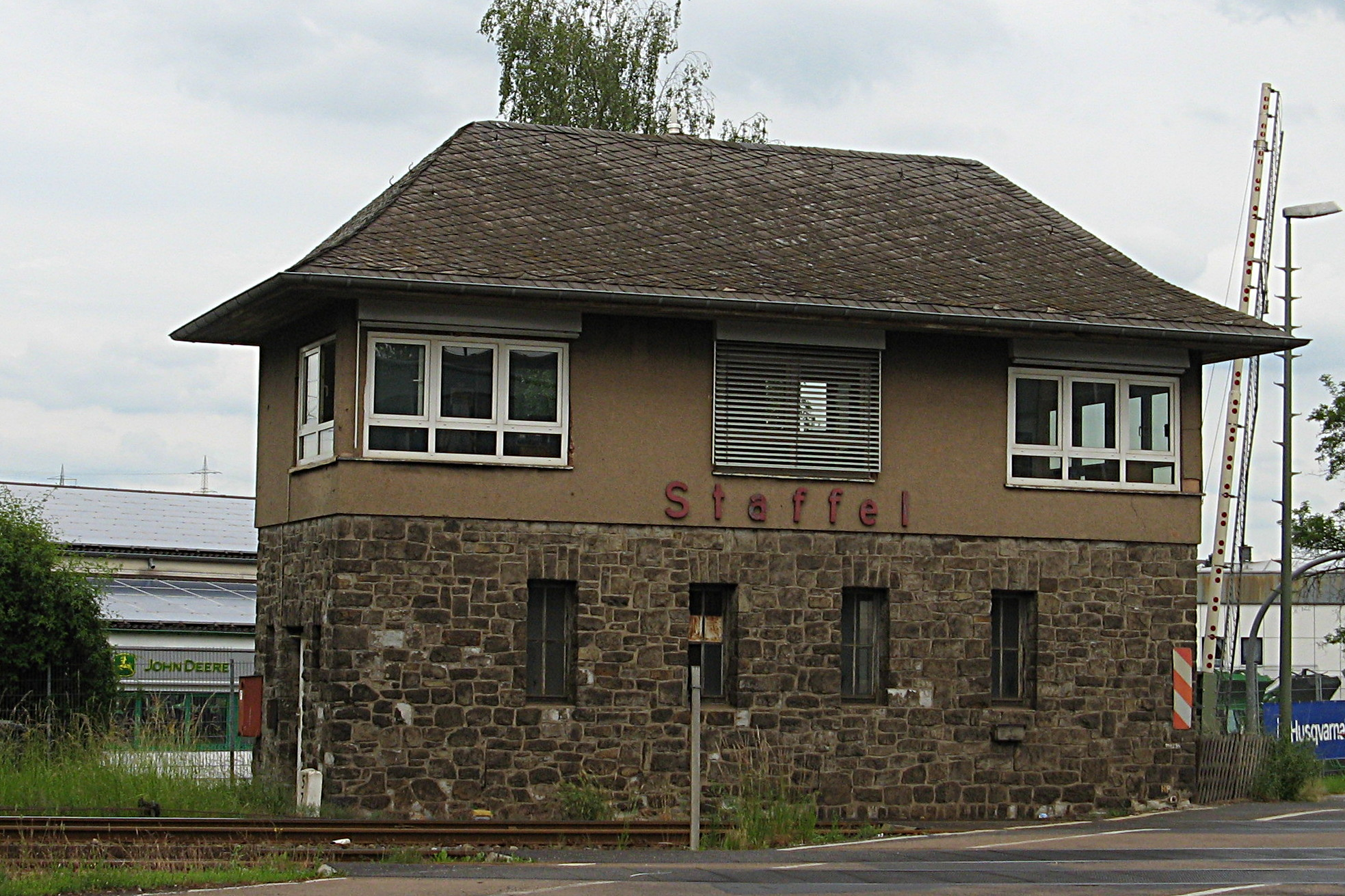 Bahnhof Staffe: Stellwerk Nord